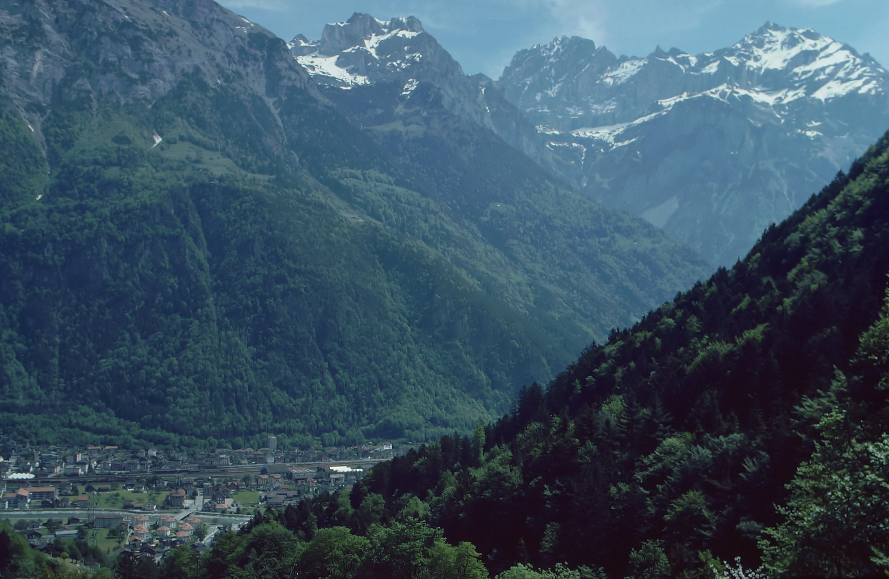 Die Ortschaft Erstfeld im Tal der Reuss - Blick zurück beim Aufstieg ins Erstfeldertal; Kanton Uri/Zentralschweiz